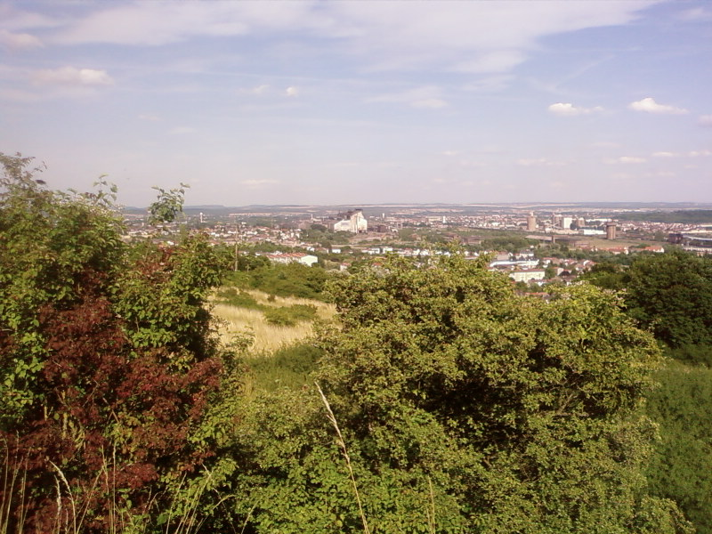 La Vallée de l'Orne (Moselle). Sur la photo, les communes de Clouange, Rombas, Vitry-sur-Orne, Gandrange, Hagondange, Amnéville, ainsi que le site sidérurgique Arcelor Mittal de Gandrange (au centre). L'Orne passe juste derrière cette usine. Lieu : La photo est prise sur la colline dominant la commune de Clouange.